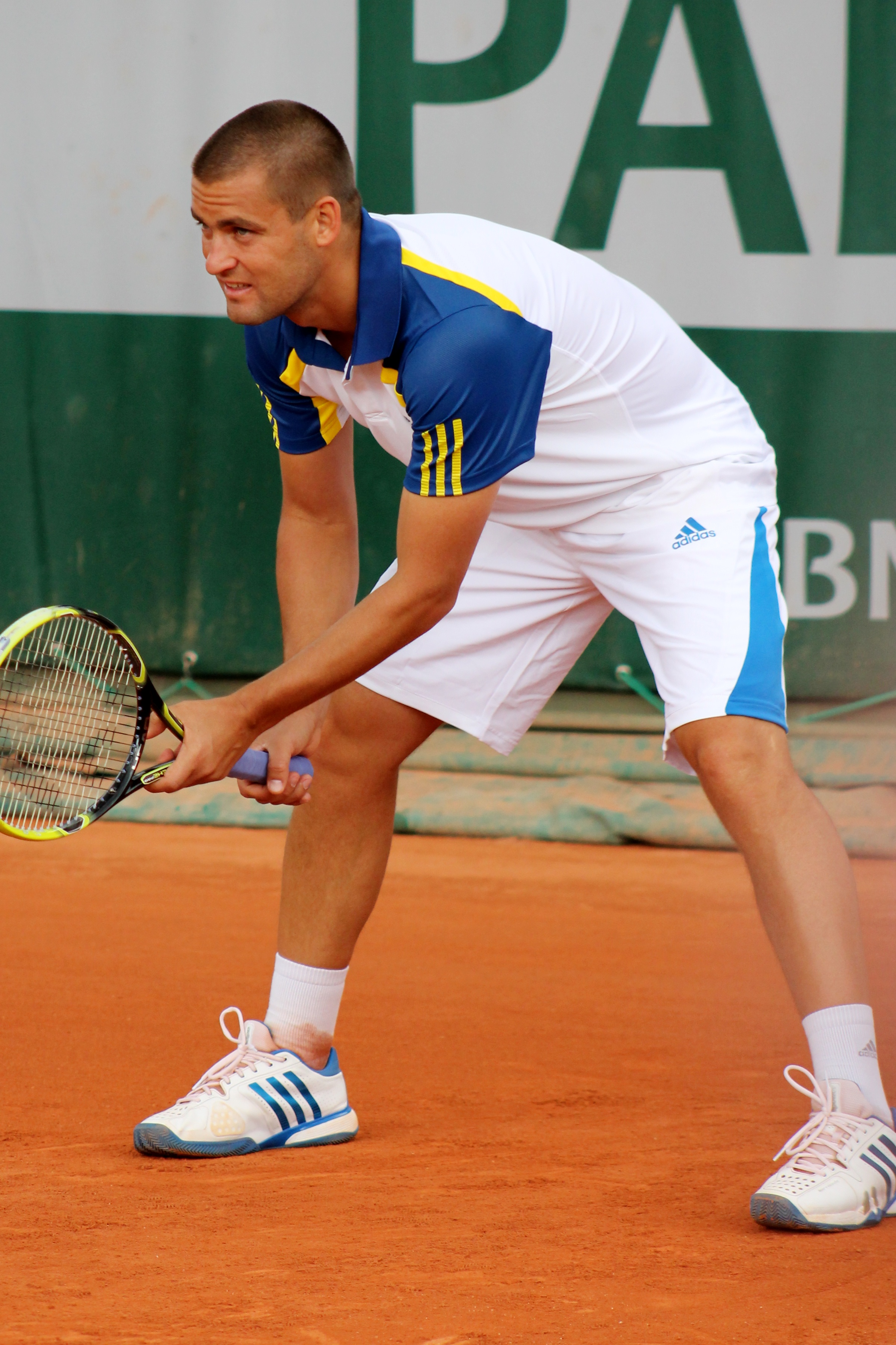 Youzhny RG13 (4)